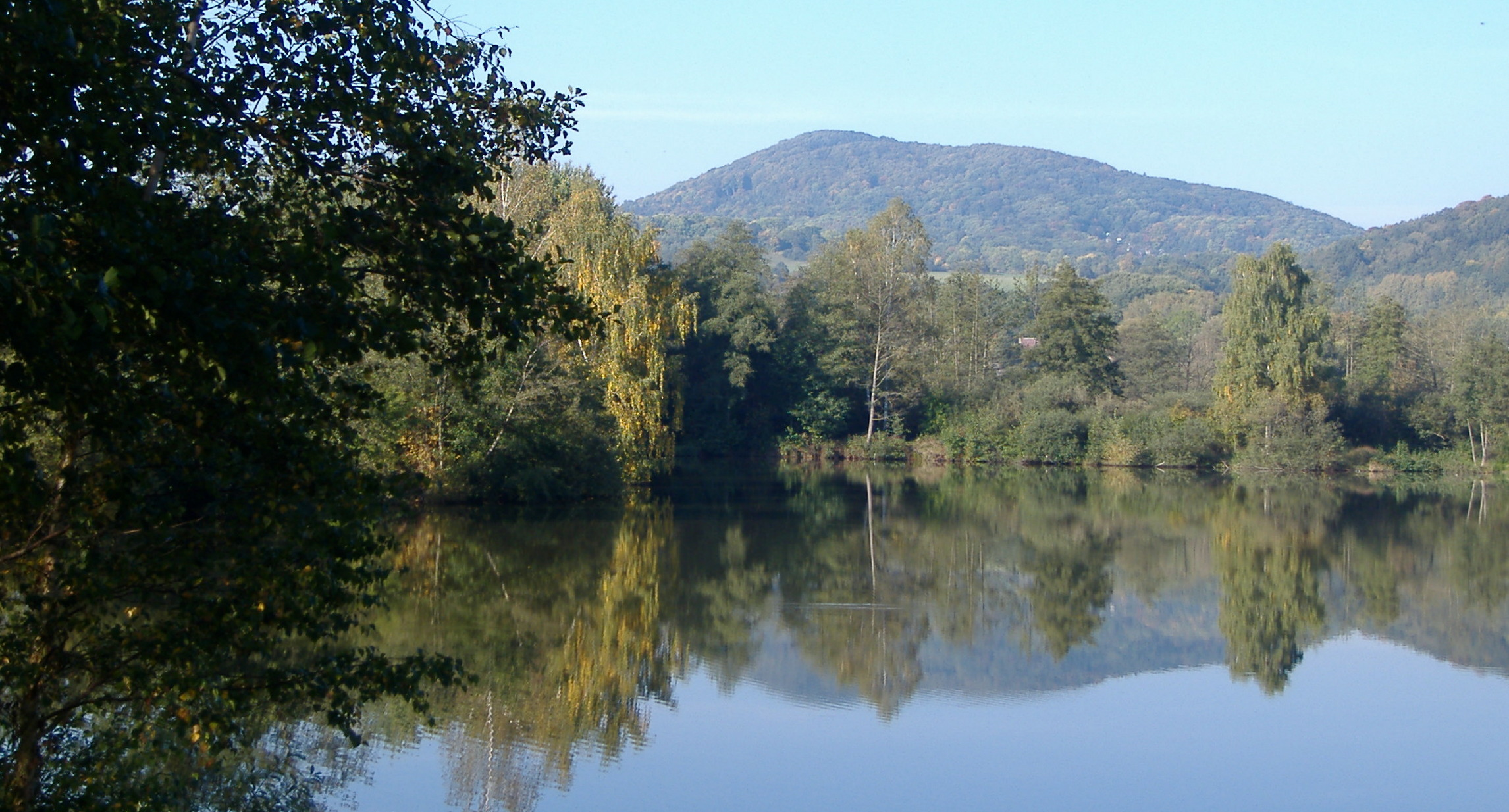 Dubický rybník